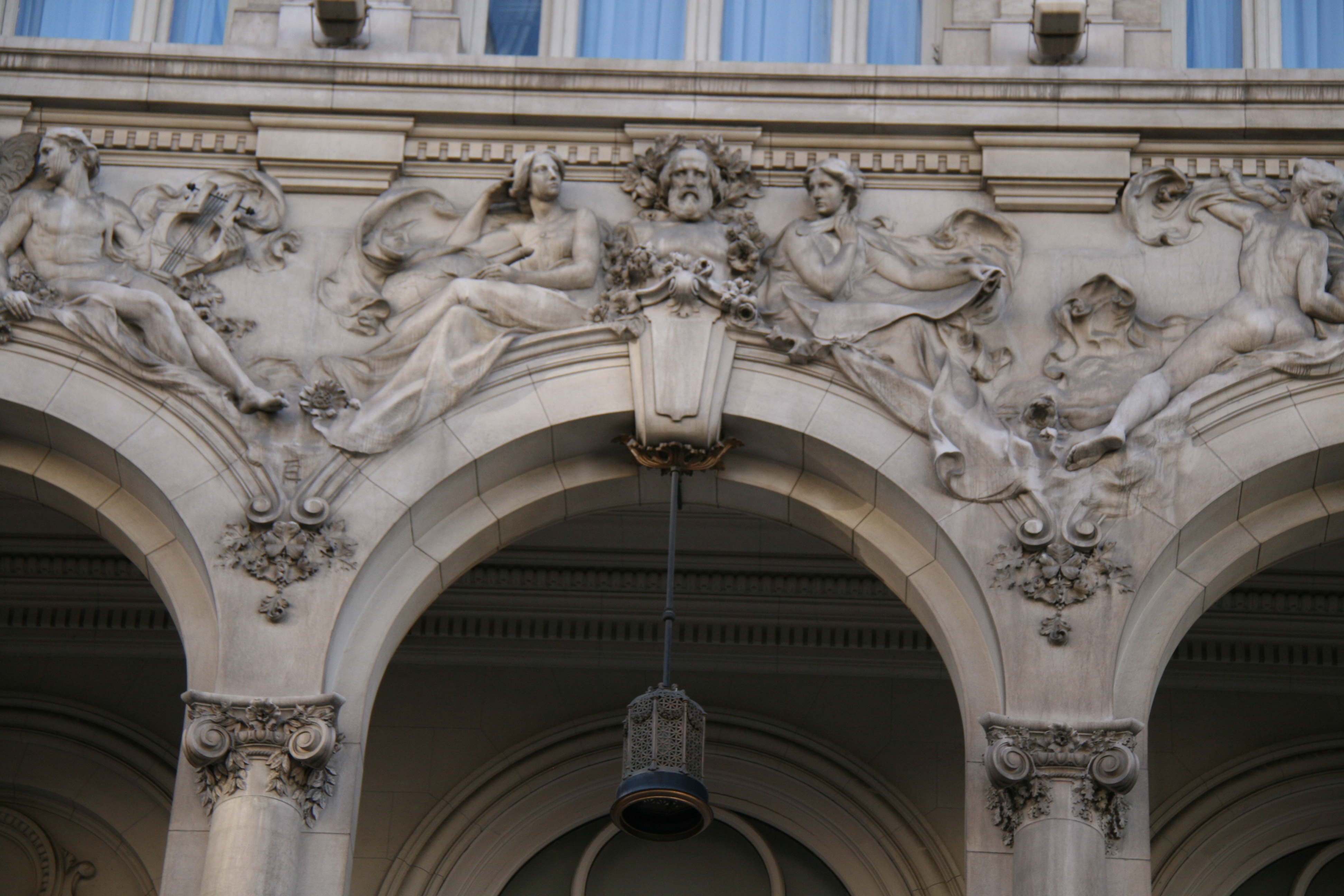 Detalle del Casino de Madrid